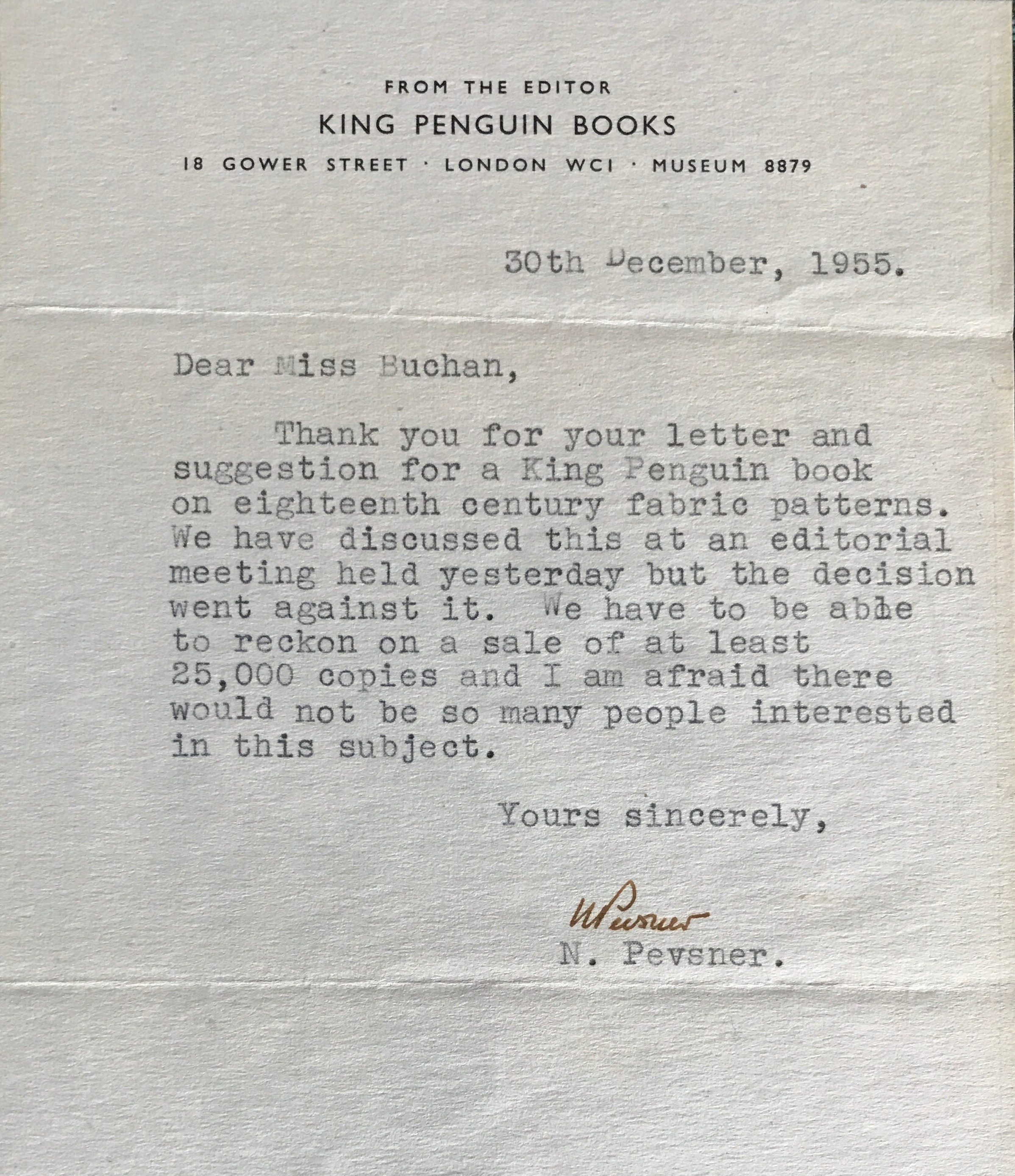 Business letter from 1955